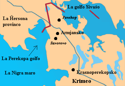 Simpla Esperanta mapeto de la Perekopa terkolo (Krimeo, Ukrainio) Esperanto versio de :dosiero:Isthmus of Perekop map.png